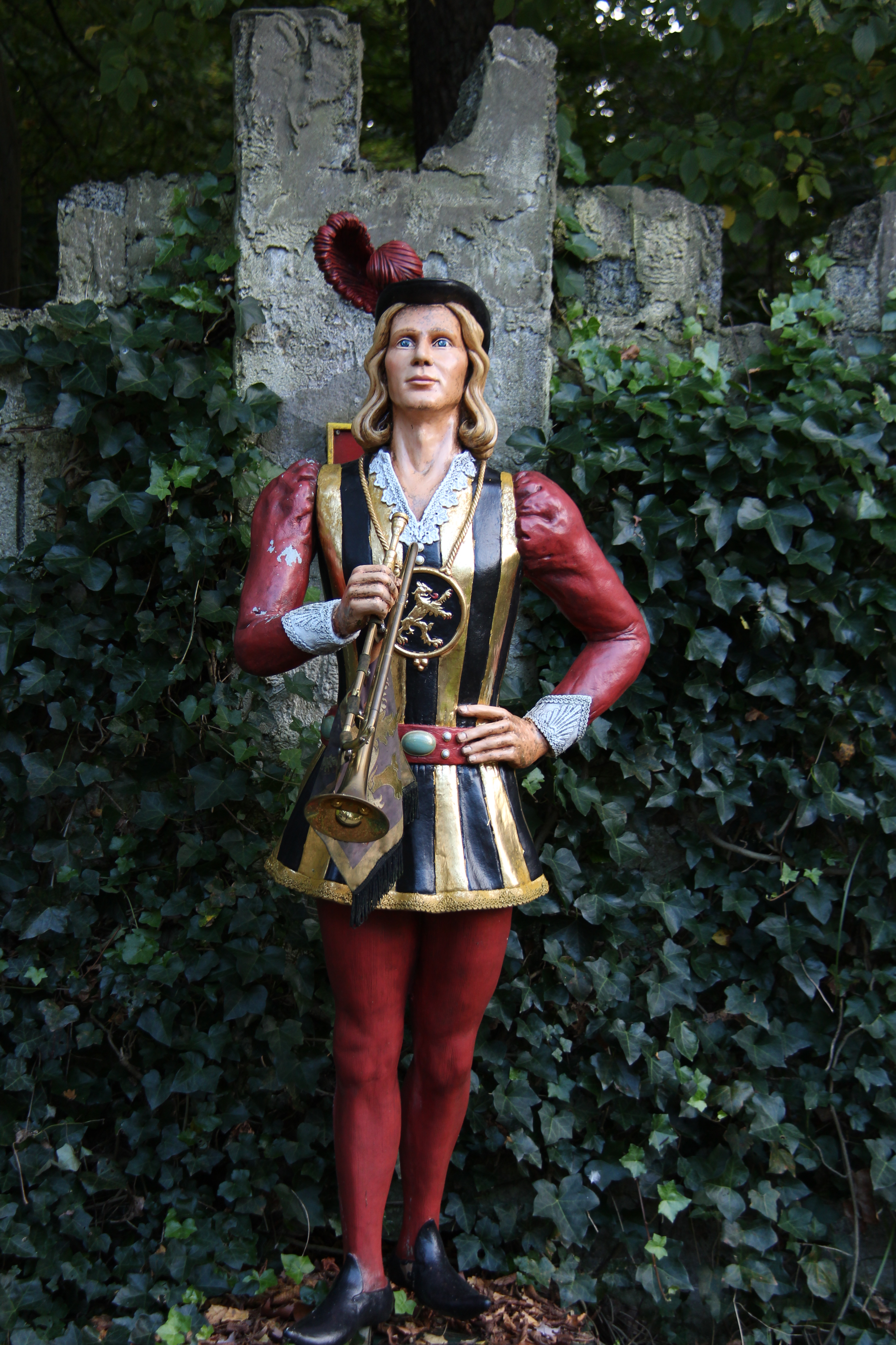 Een heraut